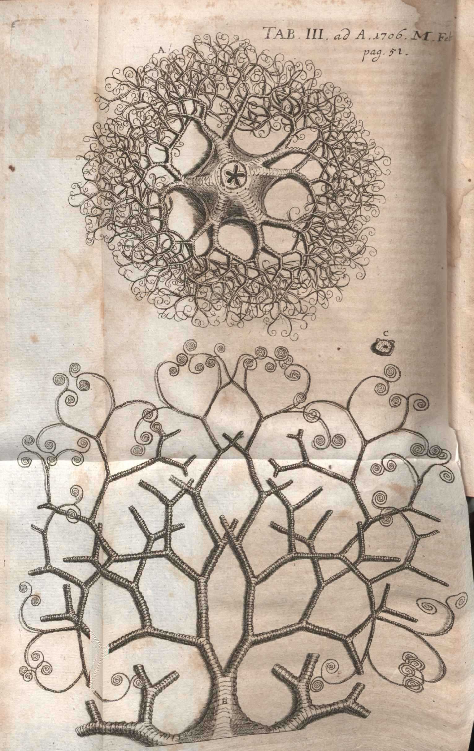 Illustration